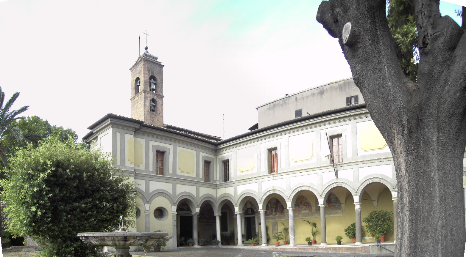 Roma, Sant'Onofrio al Gianicolo: portico esterno